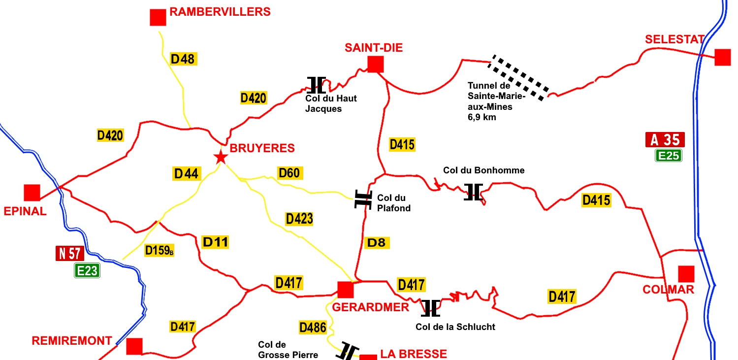 Réseau routier de Bruyères (88).